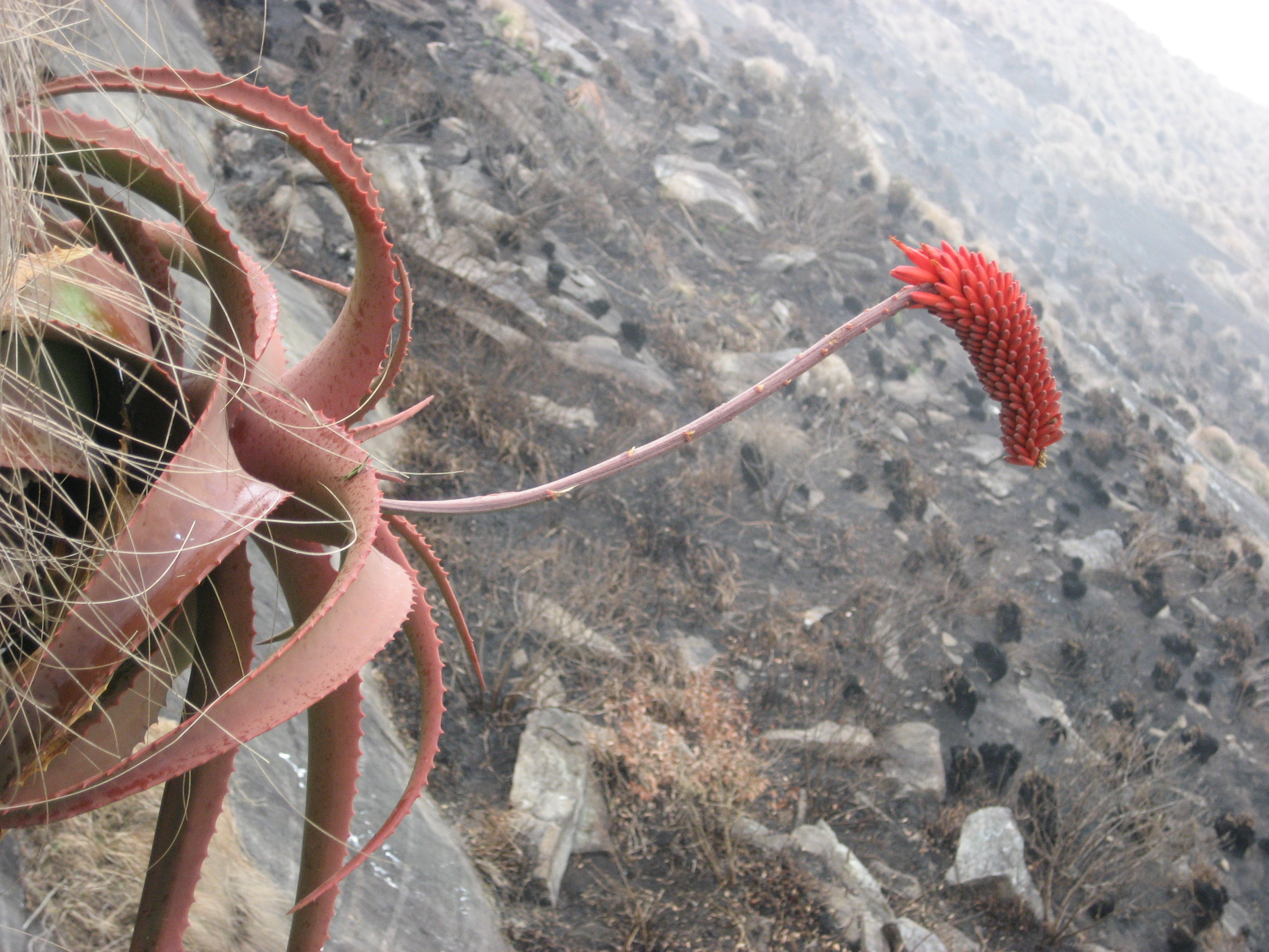 Aloe decurva - Zembe 6